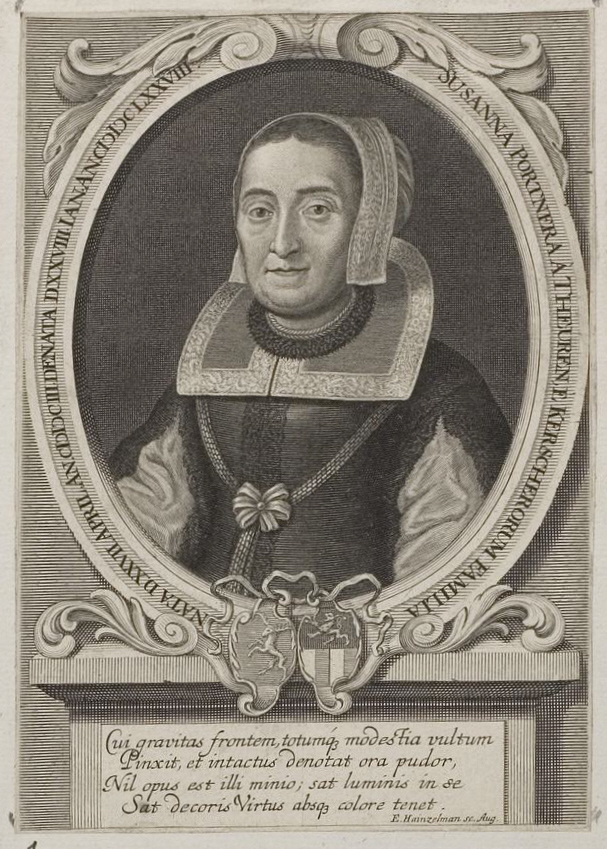 Grafik aus dem Klebeband Nr. 3 der Fürstlich Waldeckschen Hofbibliothek Arolsen Motiv: Susanna Portner von Theuern, geb. Kerscher (1603–1678), 2. Ehefrau von Peter Portner, Ratsherr und Bürgermeister in Regensburg; mit Allianzwappen Portner / Kerscher GND: 121882918